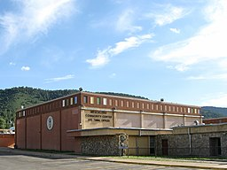 Verwaltungsgebäude des Mescalero Apache Reservats in Mescalero (New Mexico)